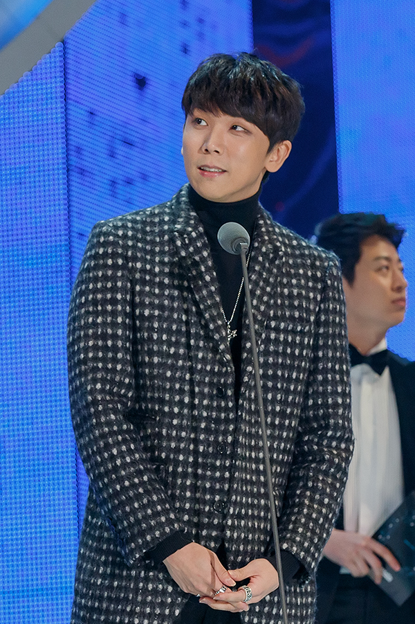 정기고 & 소유